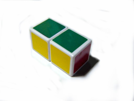 復原後的1x1x2魔術方塊